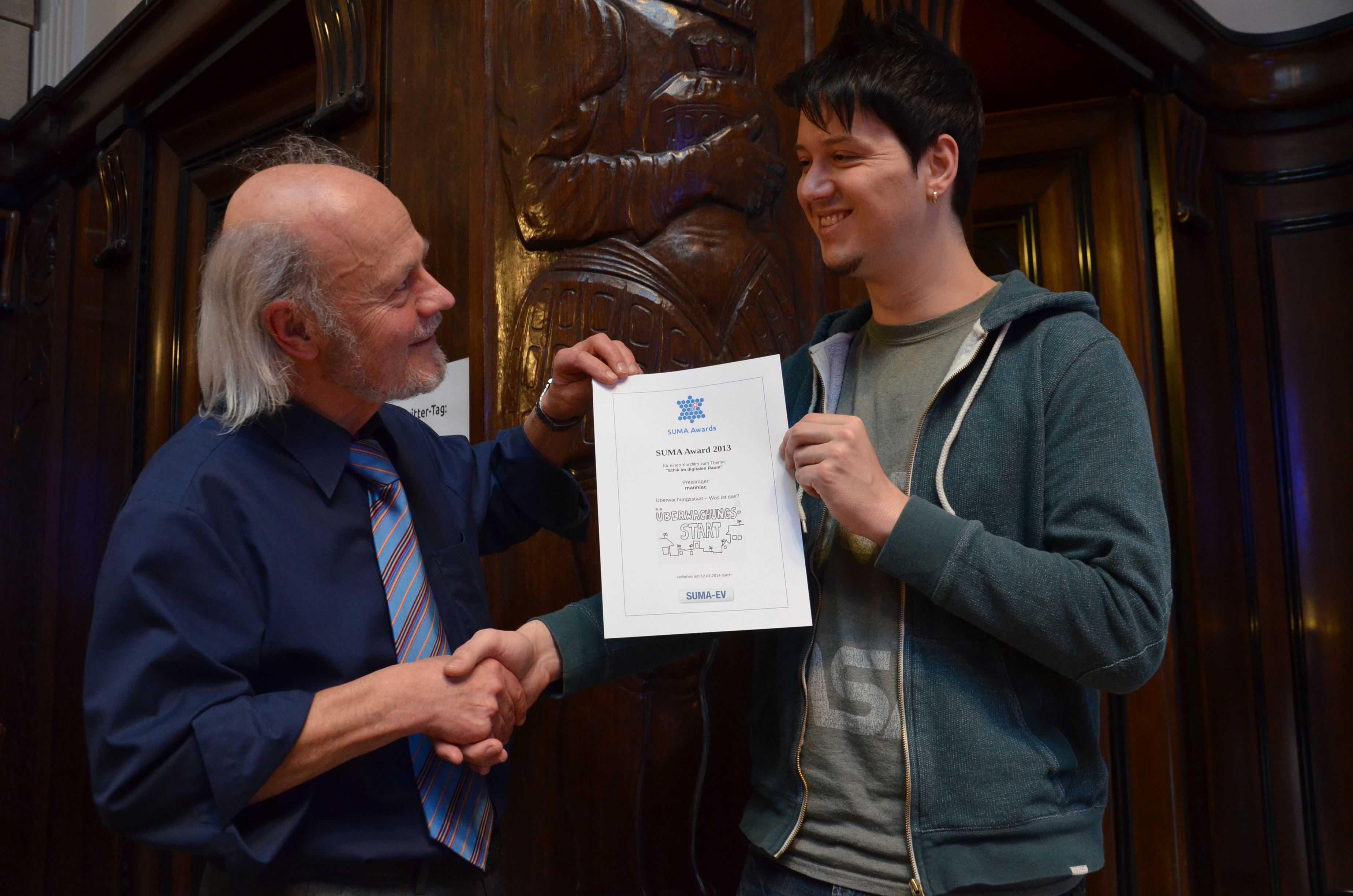 Nachgestellte Szene in der Kongress-Pause: SUMA-Vorstandsmitglied und -Geschäftsführer Wolfgang Sander-Beuermann (links) und der SUMA Award 2013-Preisträger manniac mit der Preis-Urkunde für den Kurzfilm zum Thema "Ethik im digitalen Raum mit dem Titel Überwachungsstaat - Was ist das? ...